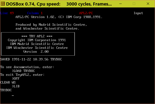 Exemple de session APL2 sous TRYAPL2 dans une DOSBox